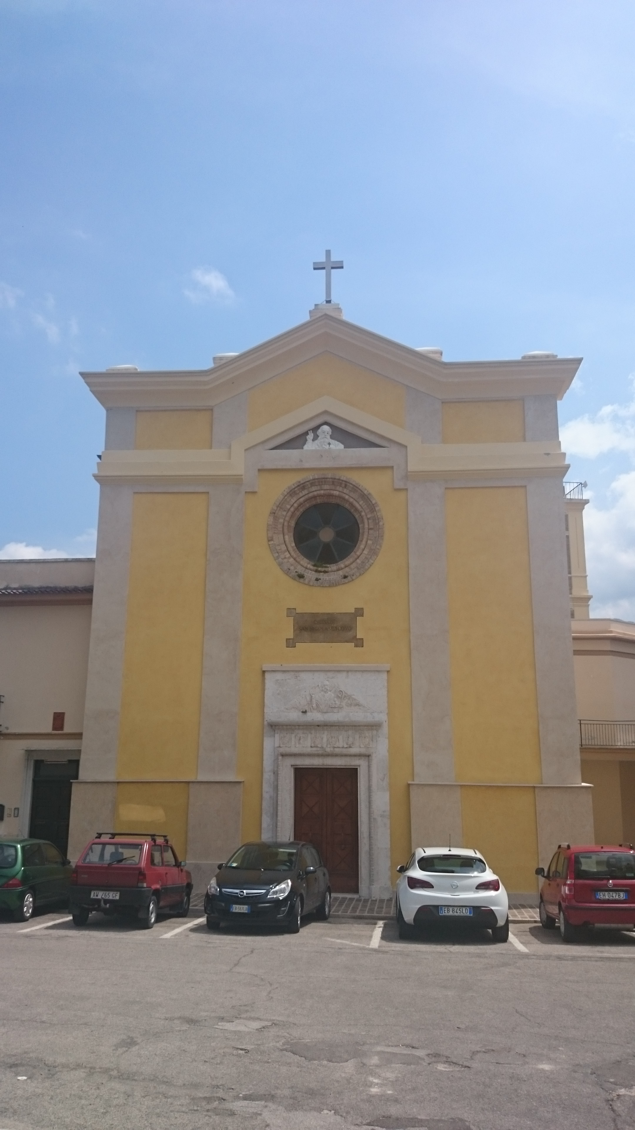 Farindola